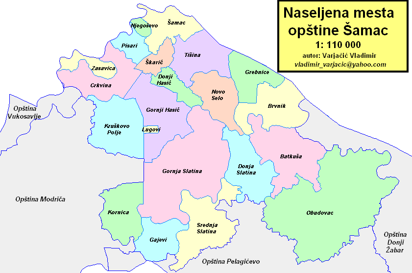 Opština Šamac